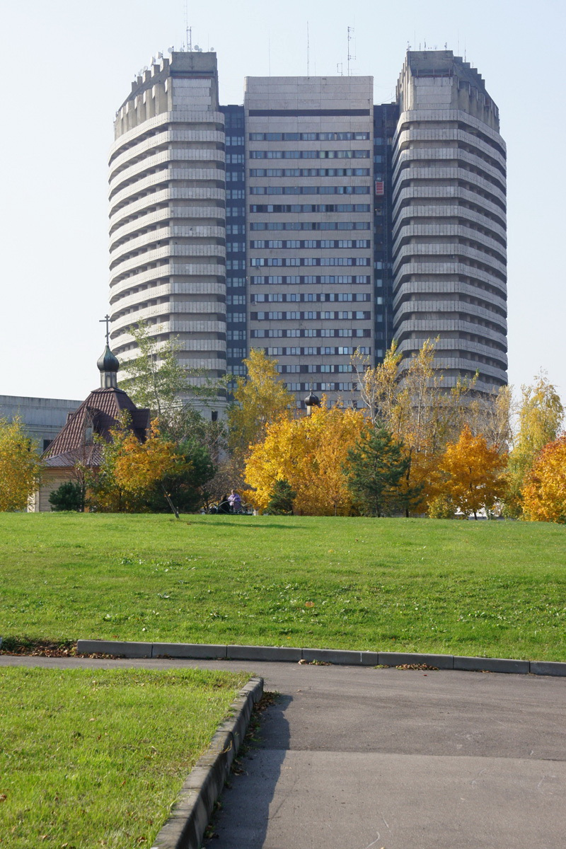 Российский онкологический научный центр РАМН им. Н. Н. Блохина